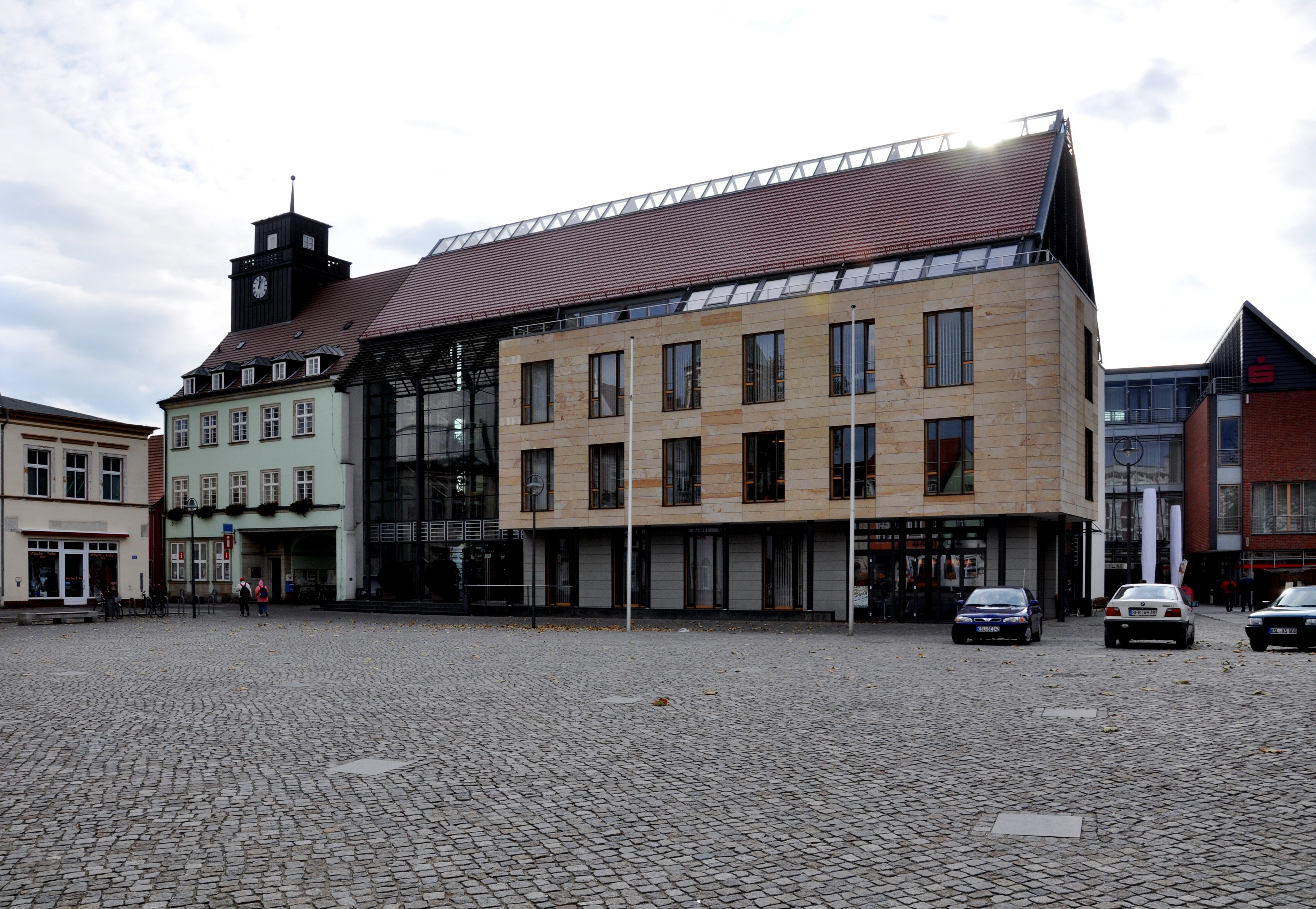 Senftenberg (Brandenburg), Rathaus am Markt (links Altbau, rechts Neubau)